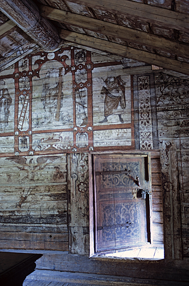 Kungsstugan i Wadköping. Hertingens kammare. Motiv: Kungsstugan Nyckelord: Byggnadsminnen, Riksintressen Kategori: Borgargård, Museum Kungsstugan i Wadköping. Hertingens kammare.